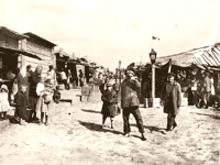 Місто Камизяк у 19 столітті